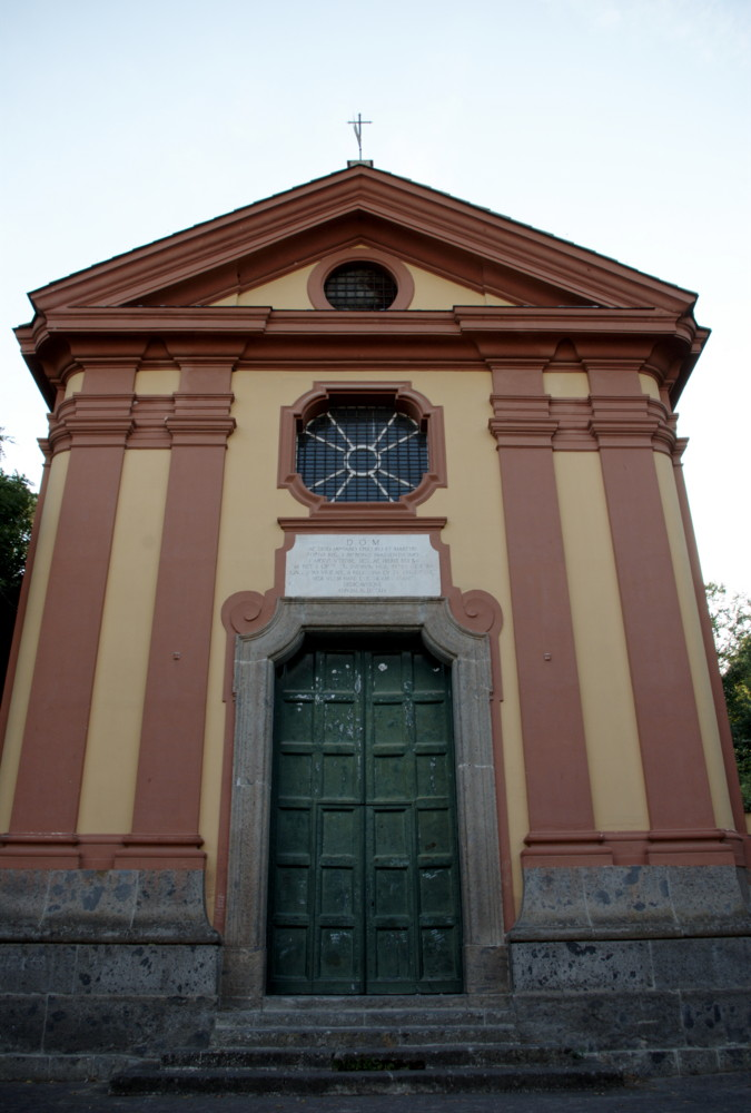 Facciata della Chiesa di San Gennaro, sita nel Parco di Capodimonte di Napoli.